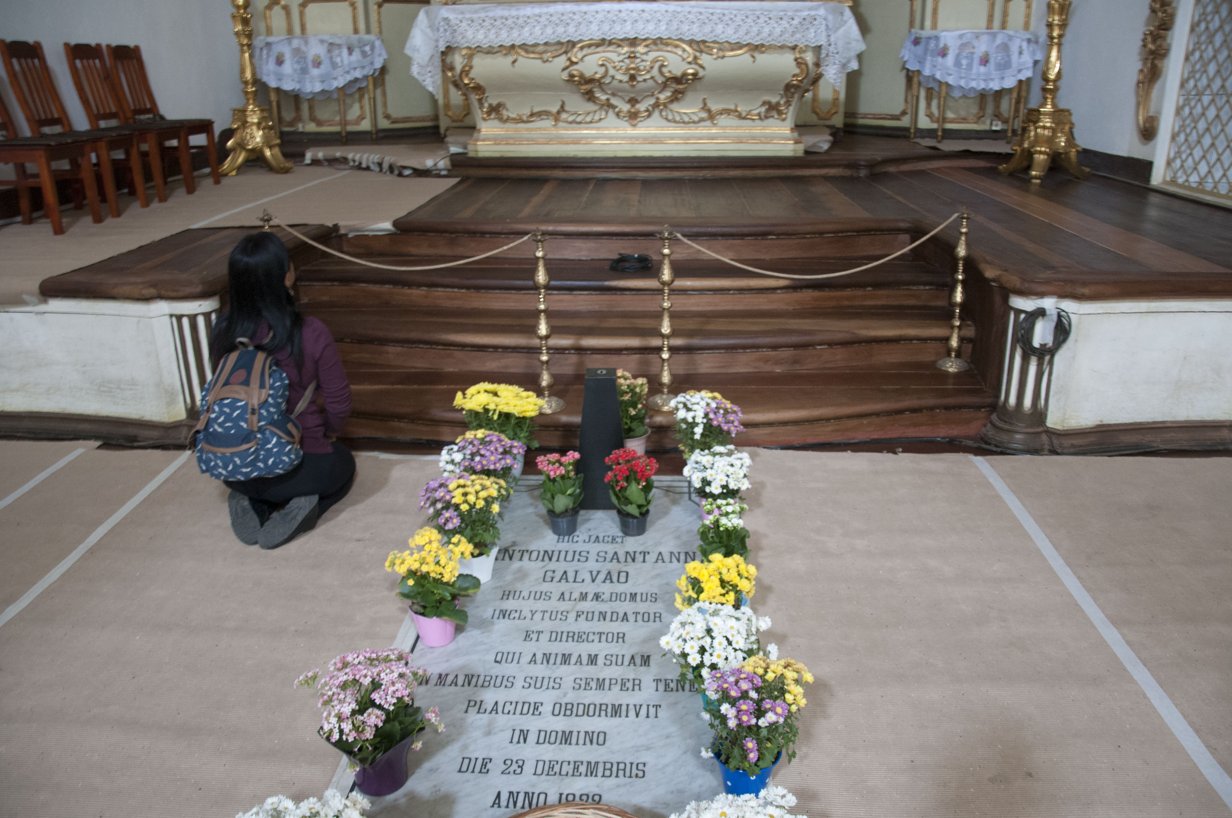 Lugar onde Frei Galvão está enterrado e altar com oferendas da capela do Mosteiro da Luz